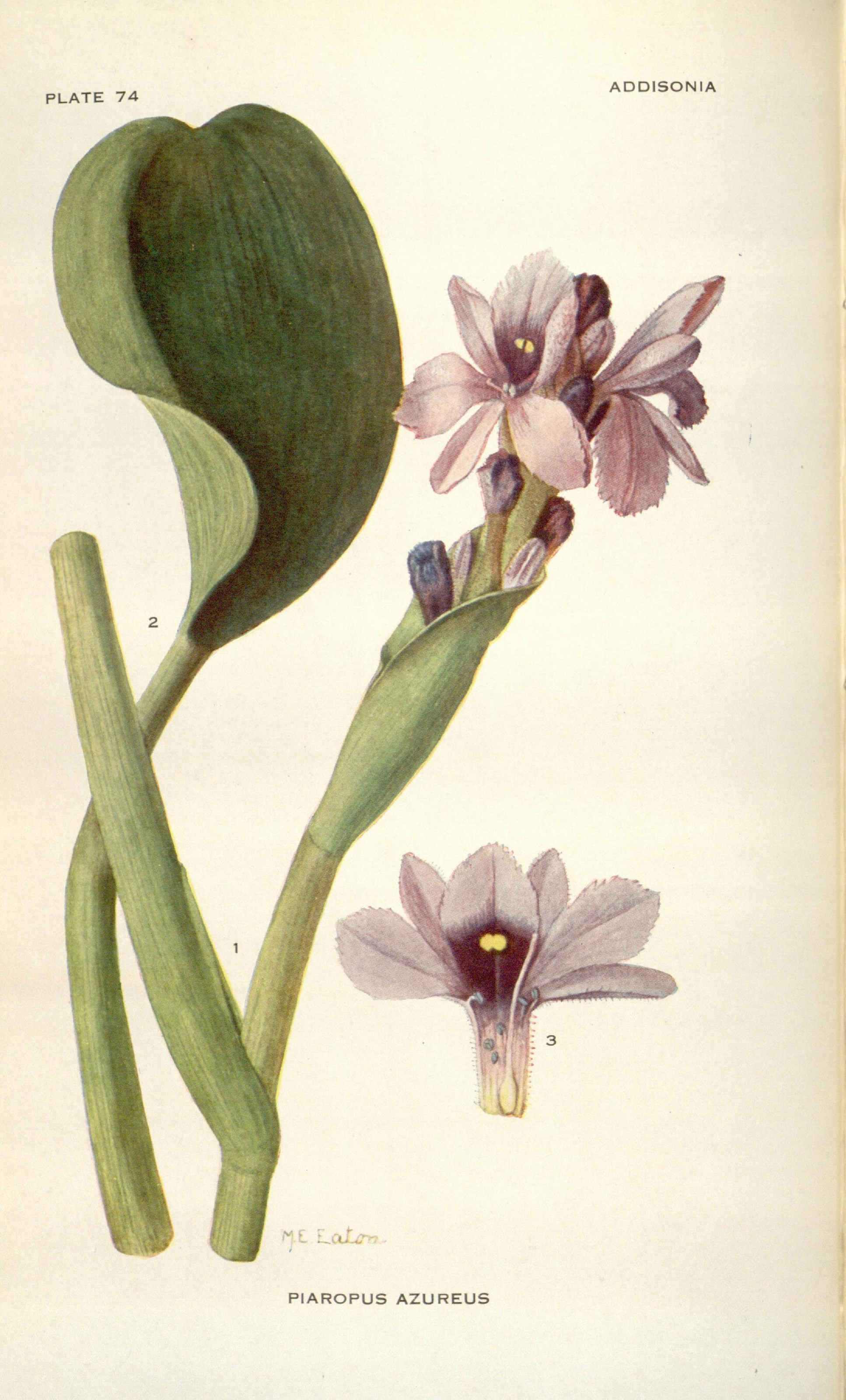 PIAROPUS AZUREUS